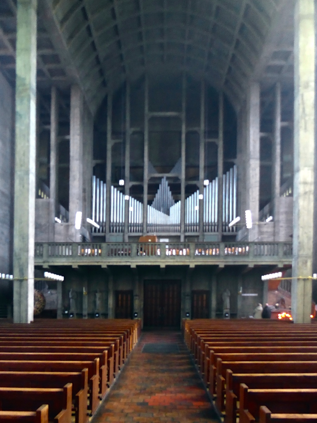 Empore mit Orgel der röm.kath.St. Anton Kirche, Basel